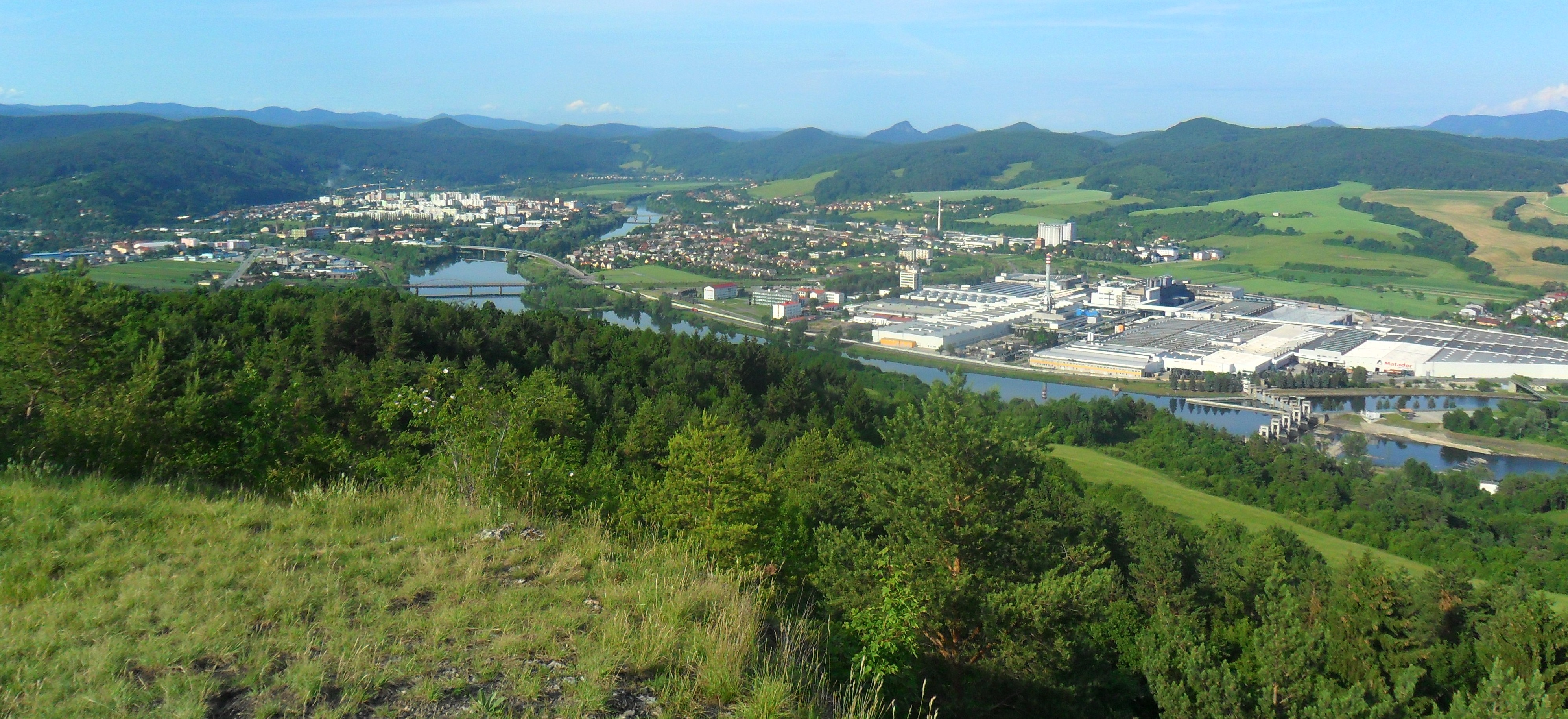 Pohľad na Púchov zo Skaly